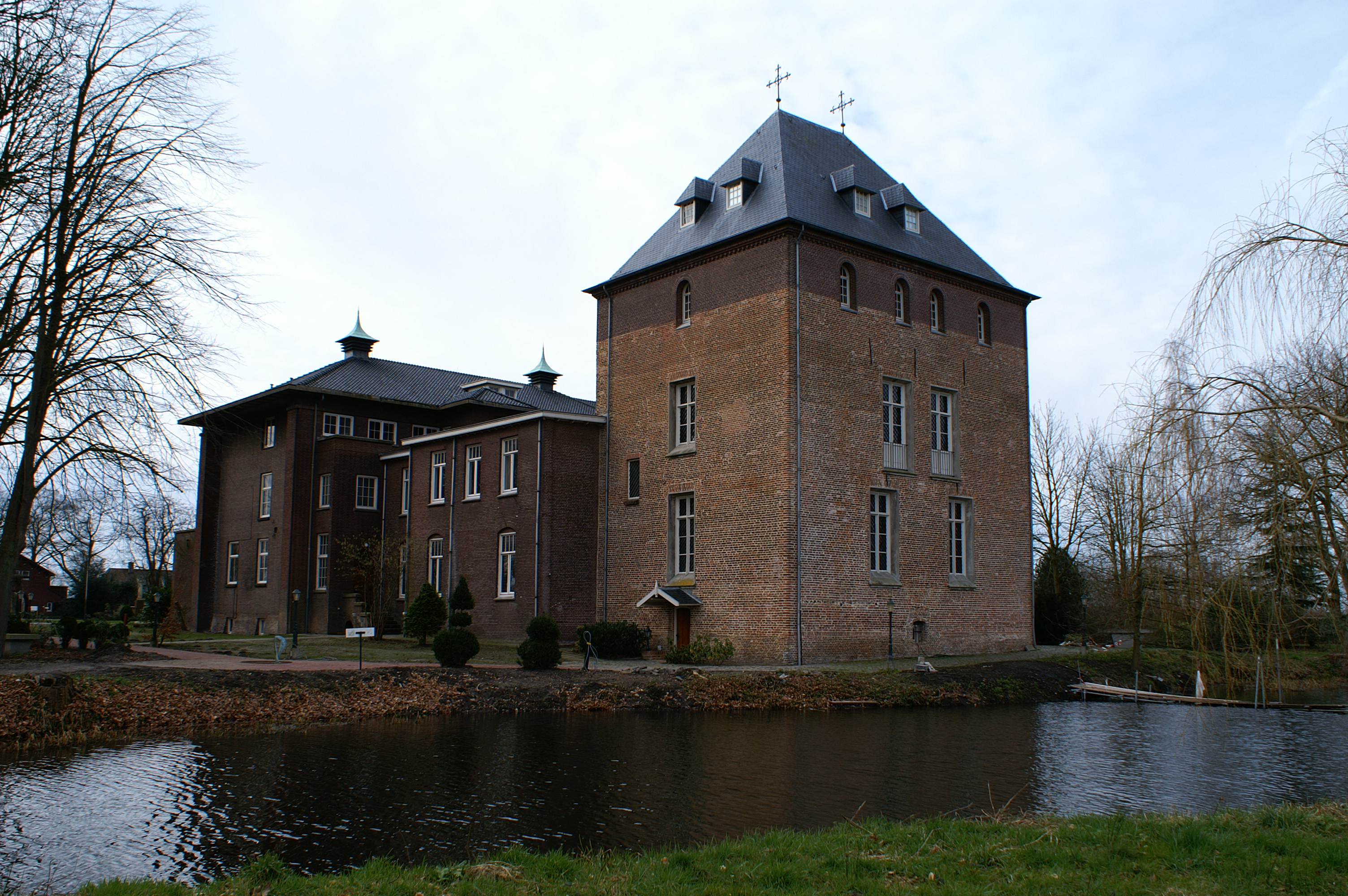 De resterende toren van het verdwenen kasteel Onsenoort te Nieuwkuijk.